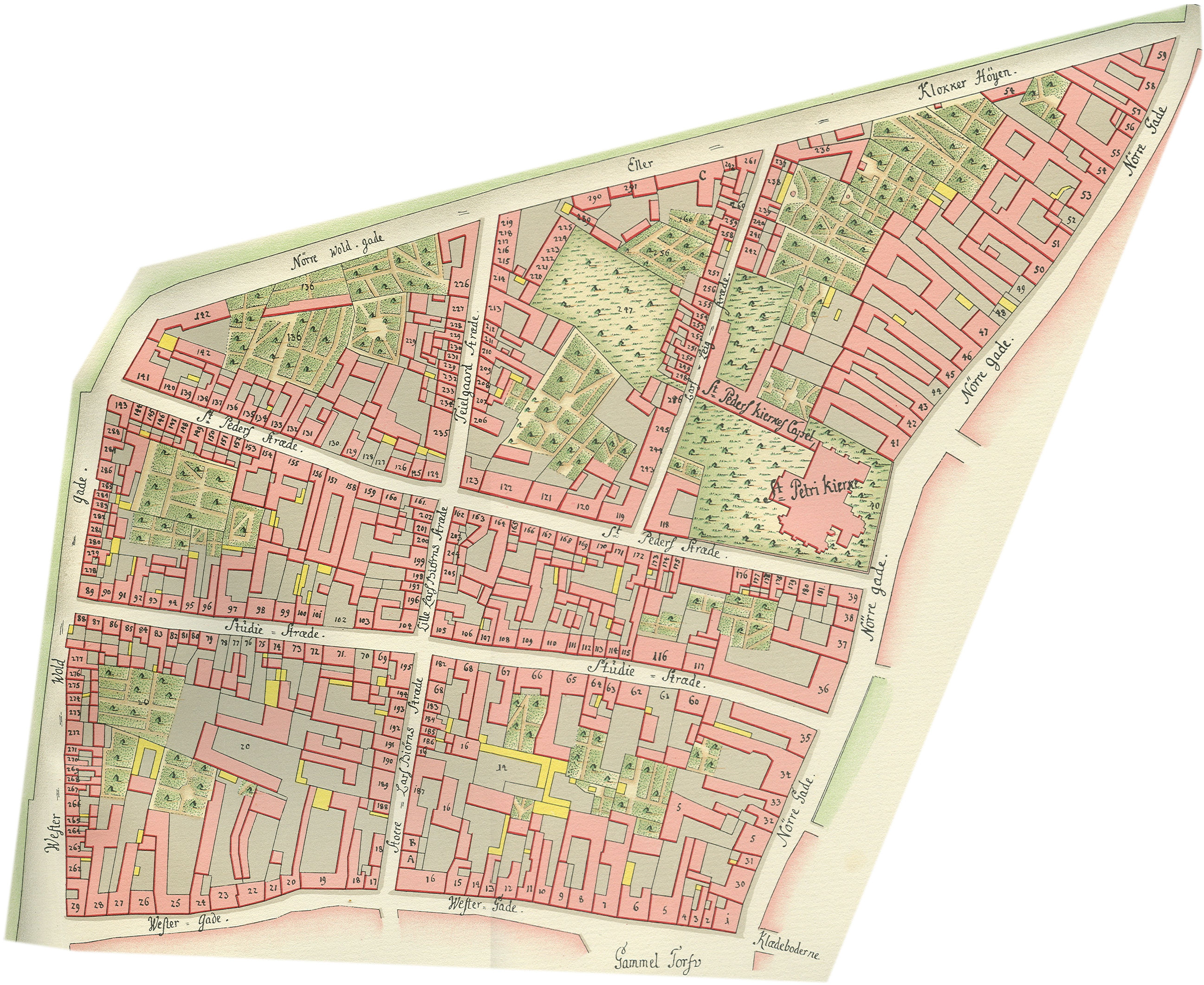 København, Nørre Kvarter, Geddes kort fra 1757